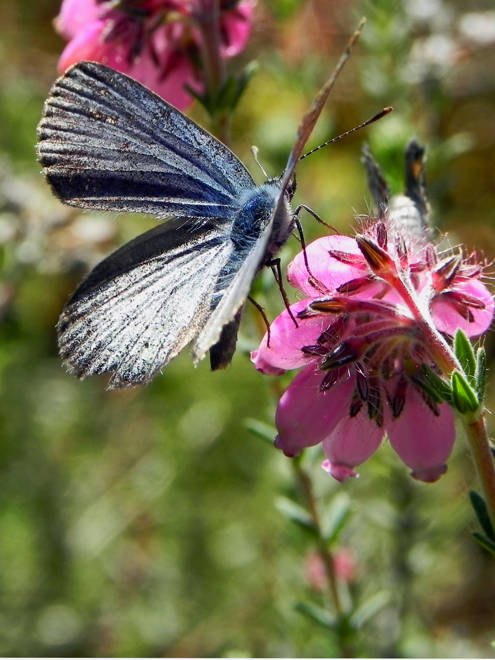 Hochmoor-Bläuling (Plebejus optilete) auf Glockenheide (Erica tetralix), Naturpark Südheide, Niedersachsen, Germany